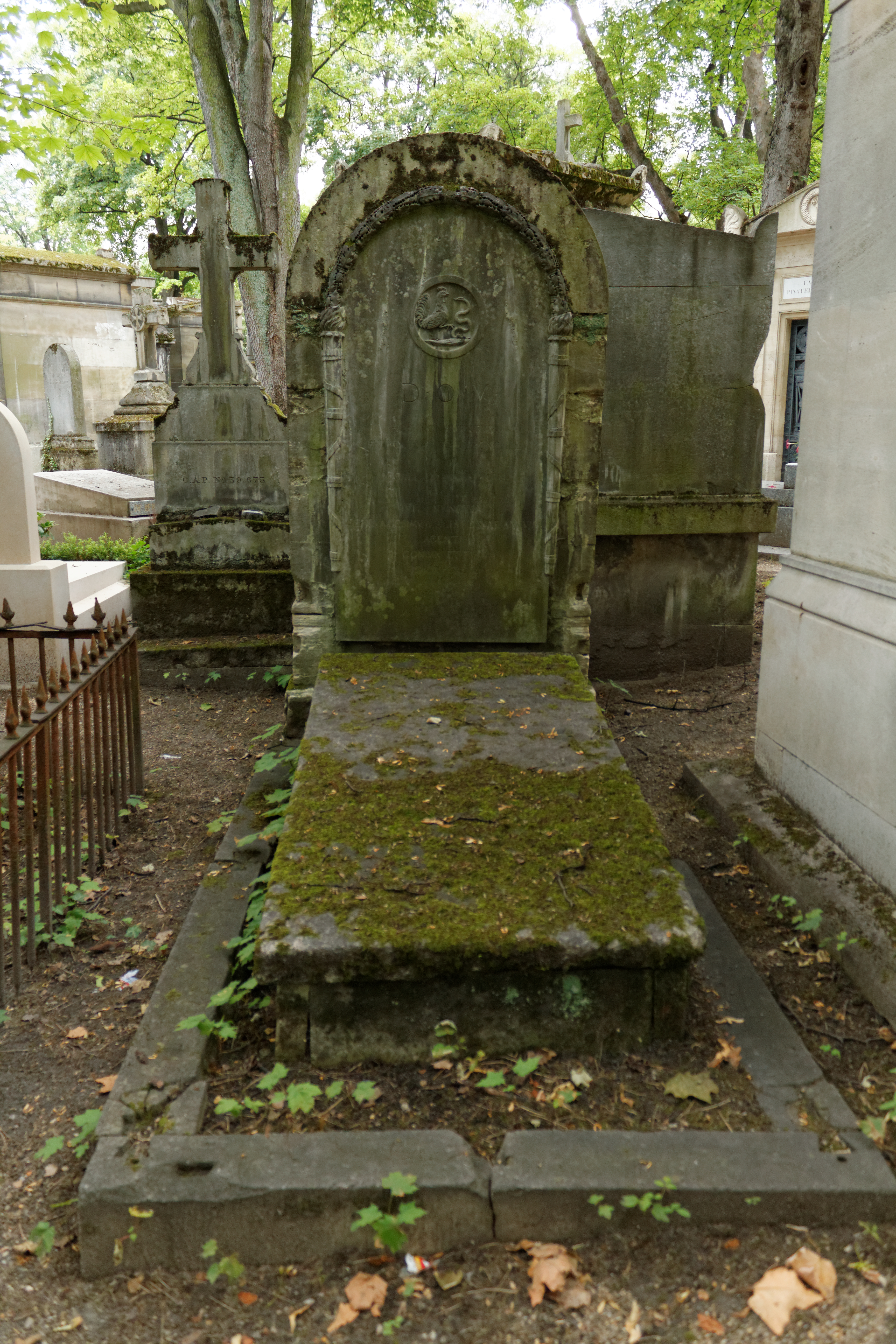 Vue d'ensemble